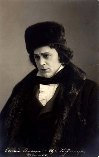 Leonid Sobinov as Lensky in Eugene Onegin